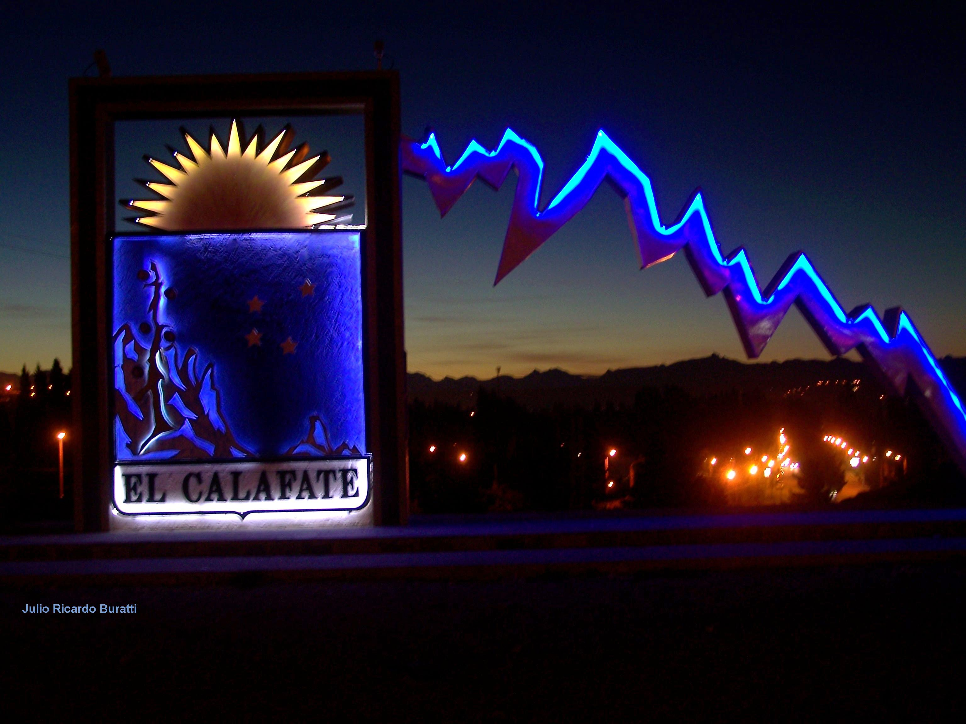 Cartel al ingreso de El Calfate